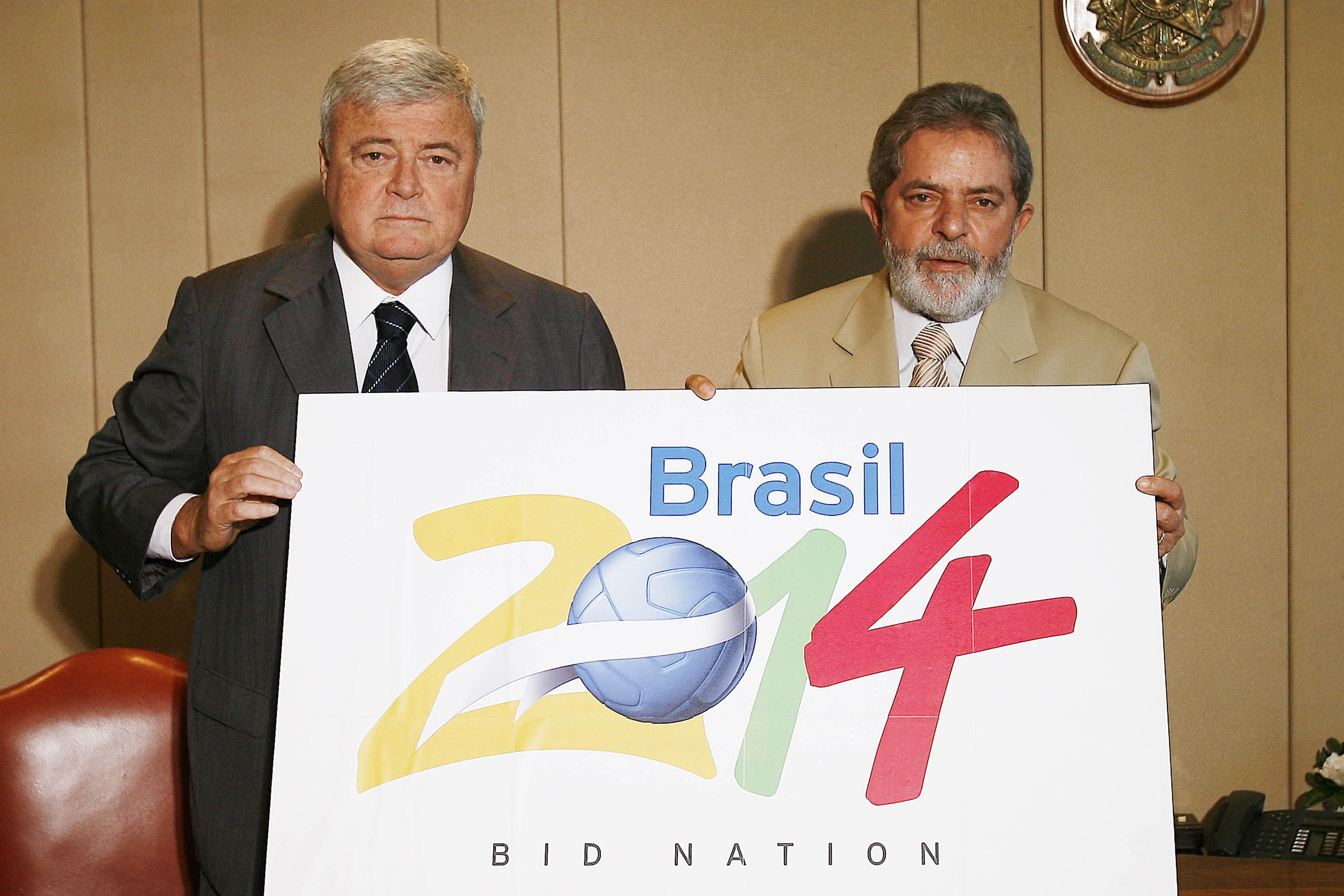 Ricardo Teixeira - prezydent Brazylijskiej Konfederacji Piłkarskiej i Luiz Inácio Lula da Silva - prezydent Brazylii